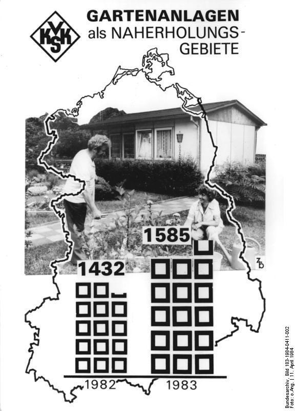 Infografik, Gartenanlagen als Naherholungsgebiete in der DDR ADN-ZB Grafik 11.4.84 Gartenanlagen als Naherholungsgebiete in der DDR. Über 1,26 Millionen Mitglieder des Verbandes der Kleingärtner, Siedler und Kleintierzüchter, die in 17815 Sparten organisiert sind, leisten einen großen Beitrag zur Versorgung der Bevölkerung und eröffnen immer mehr Bürgern Möglichkeiten einer aktiven Erholung. Quelle: Presse Informationen 35-84